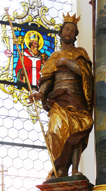 Pfarrkirche St. Magnus, Waldburg, Landkreis Ravensburg Hochaltar: Richard, Ehemann der Wuna (Schwester des hl. Bonifatius), Vater der waldburgischen Erbpatrone Willibald, Wunibald und Walburga